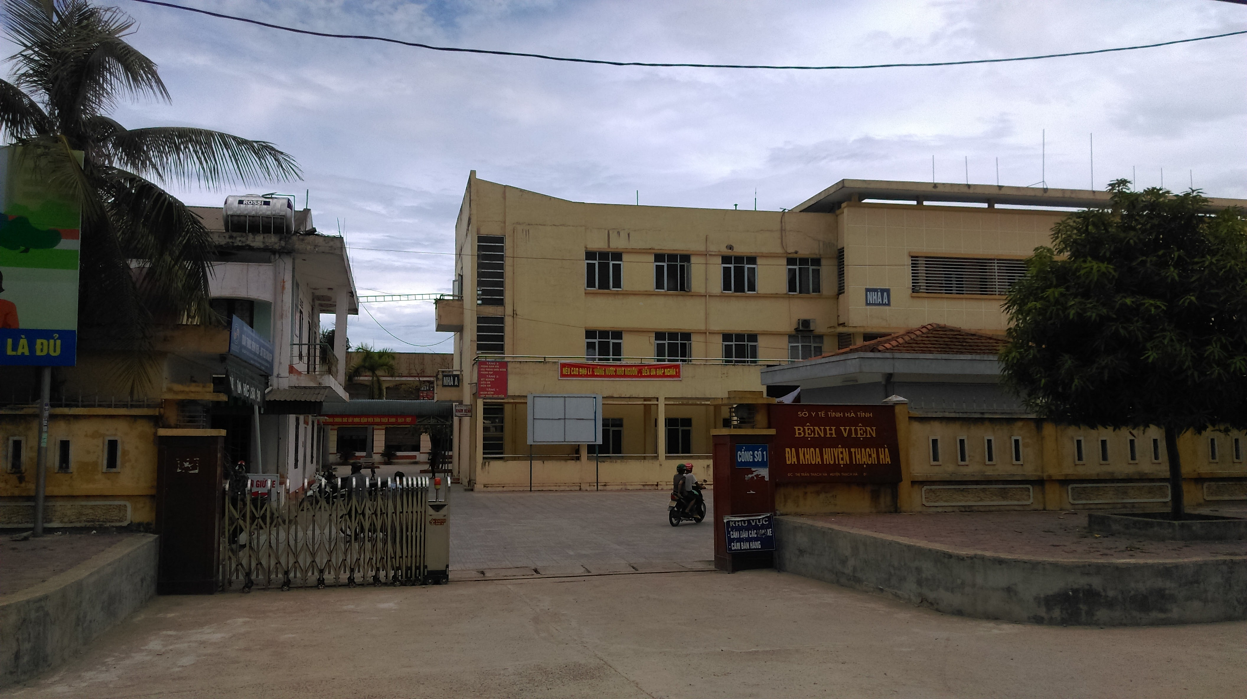 Bệnh viện Đa khoa huyện Thạch Hà